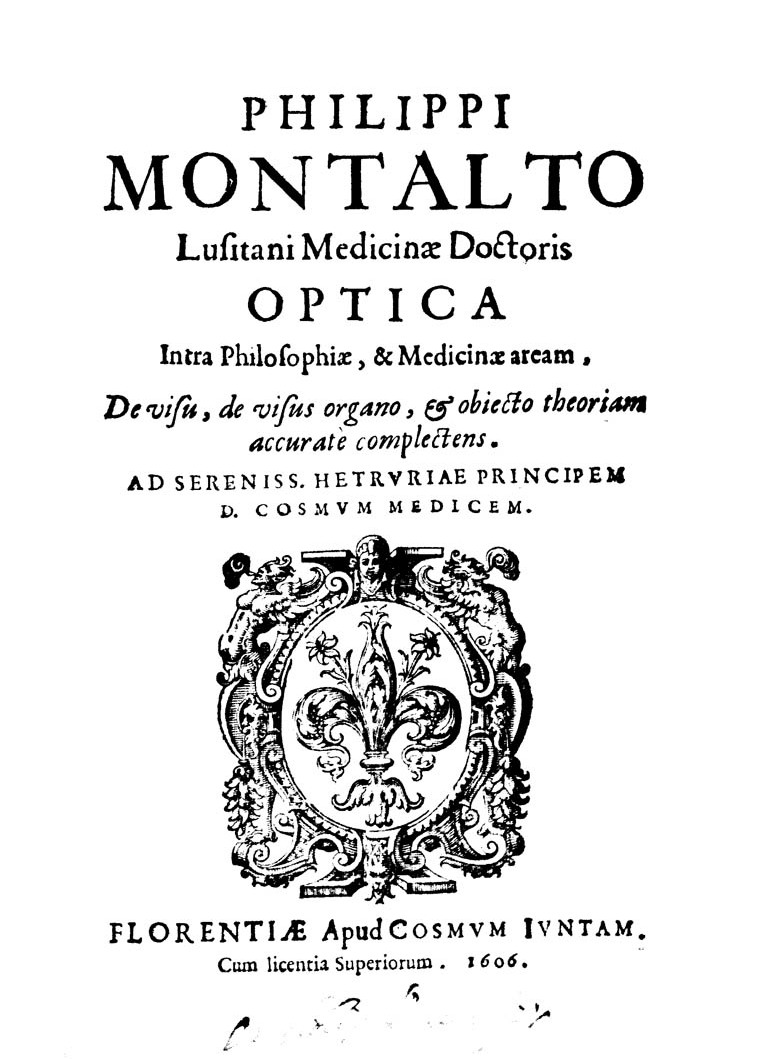 Philippi Montalto ... Optica intra philosophiae, & medicinae aream, de visu, de visus organo, & obiecto theoriam accurate complectens. …. - Florentiae : apud Cosmum Iunctam, 1606 (Florentiae : apud Cosmum Iuntam, 1606). - [16], 259 [i.e. 289, 7] p. ; 4º .